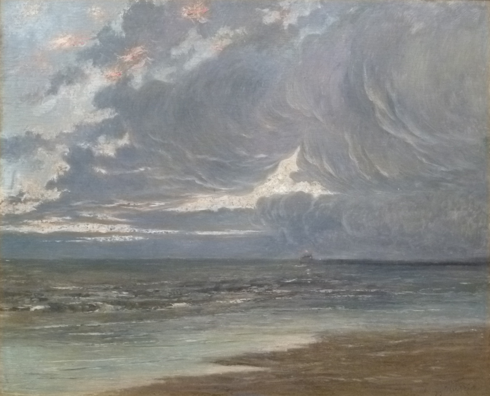 La mer au crépuscule à Ostende, olieverf op paneel (80 x 100 cm); door de Belgische schilder Vital Keuller (1866-1945); privébezit